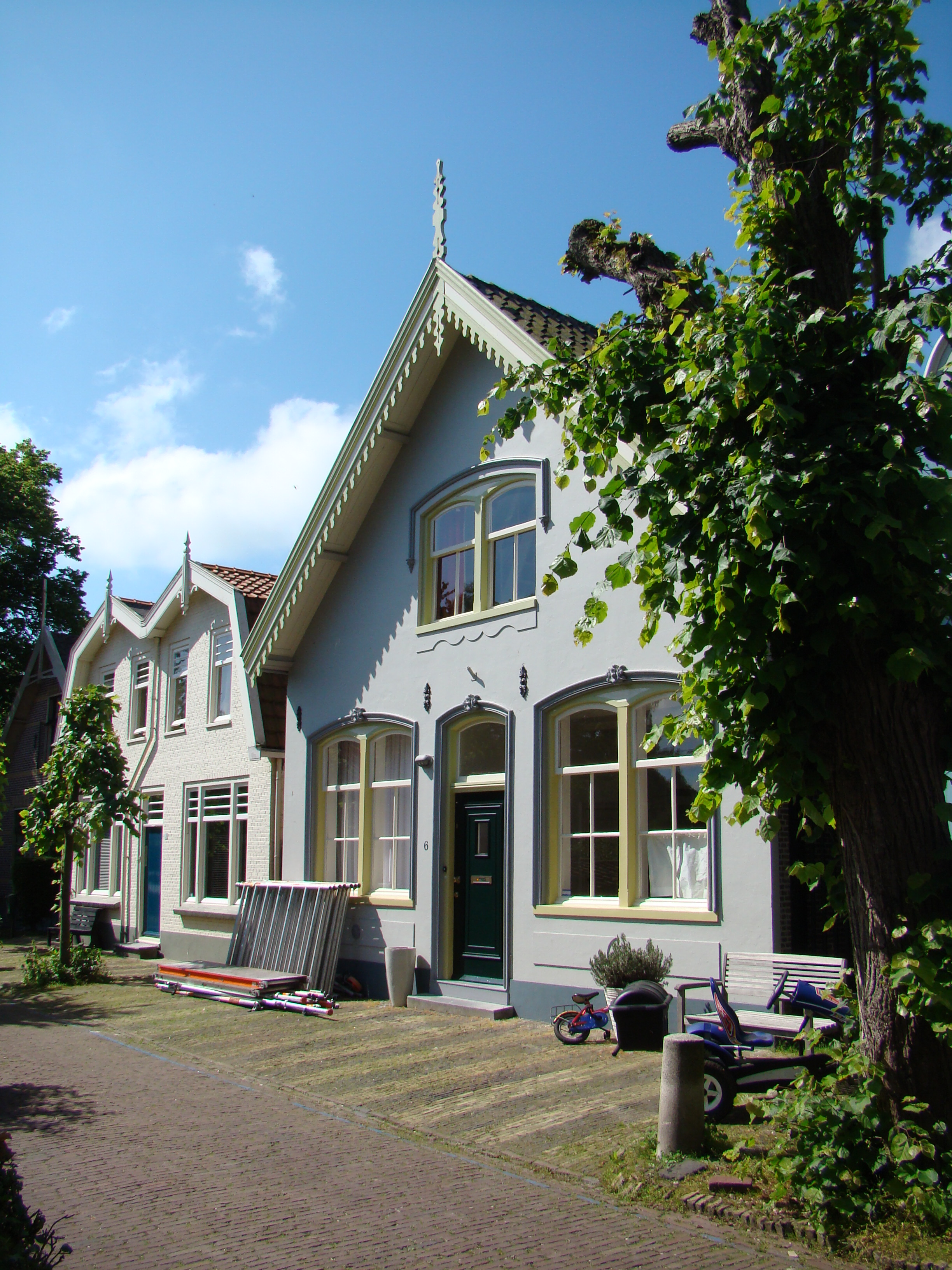 Rijksmonumenten in Broek in Waterland, Netherlands, Laan 6